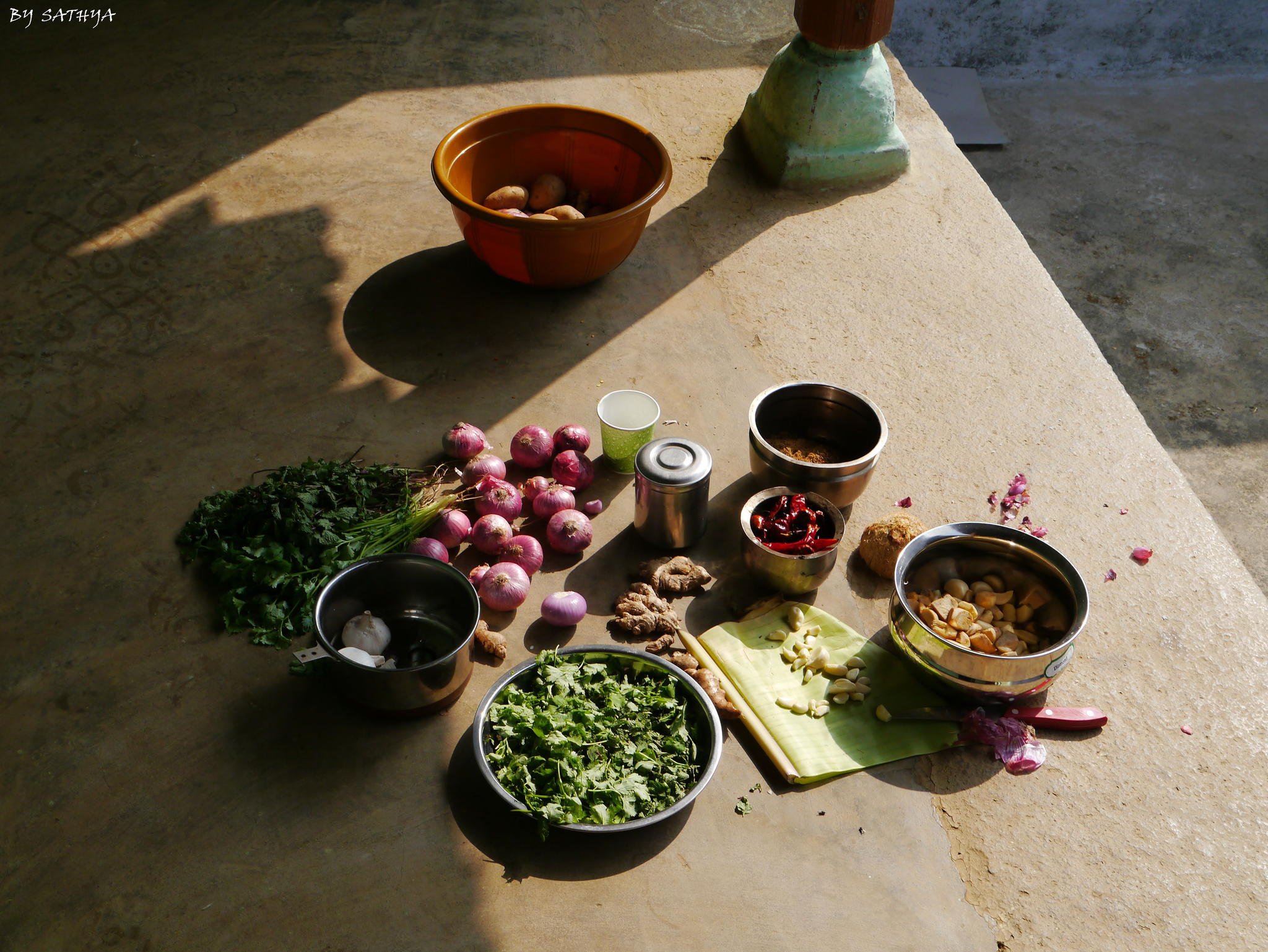 Индийская еда, масала